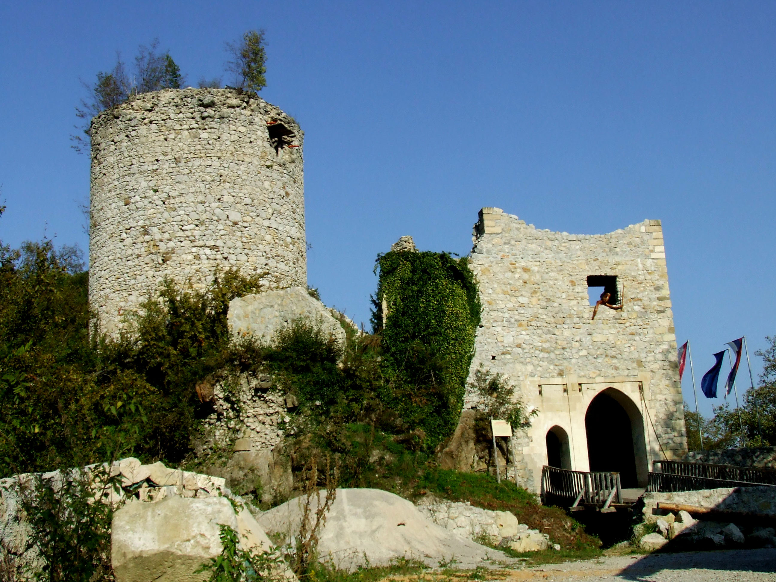 Grad Žovnek, kraj od koder je izšla znamenita rodbina Grofov Celjskih